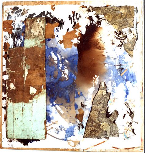 Fotografie einer Collage von Emmanuel Flipo